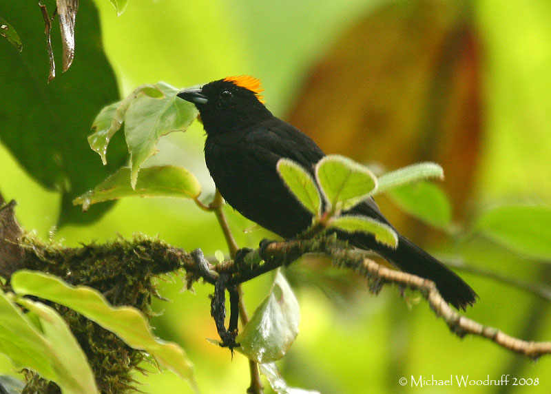 Tawny-crested Tanager, Quebrada Gonzalez Station, Parque Nacional Brauilio Carillo, Costa Rica 9 July 2008